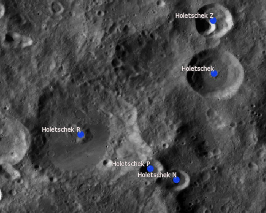 Cráter lunar Holetschek. Cráteres satélite. (Imagen LRO)